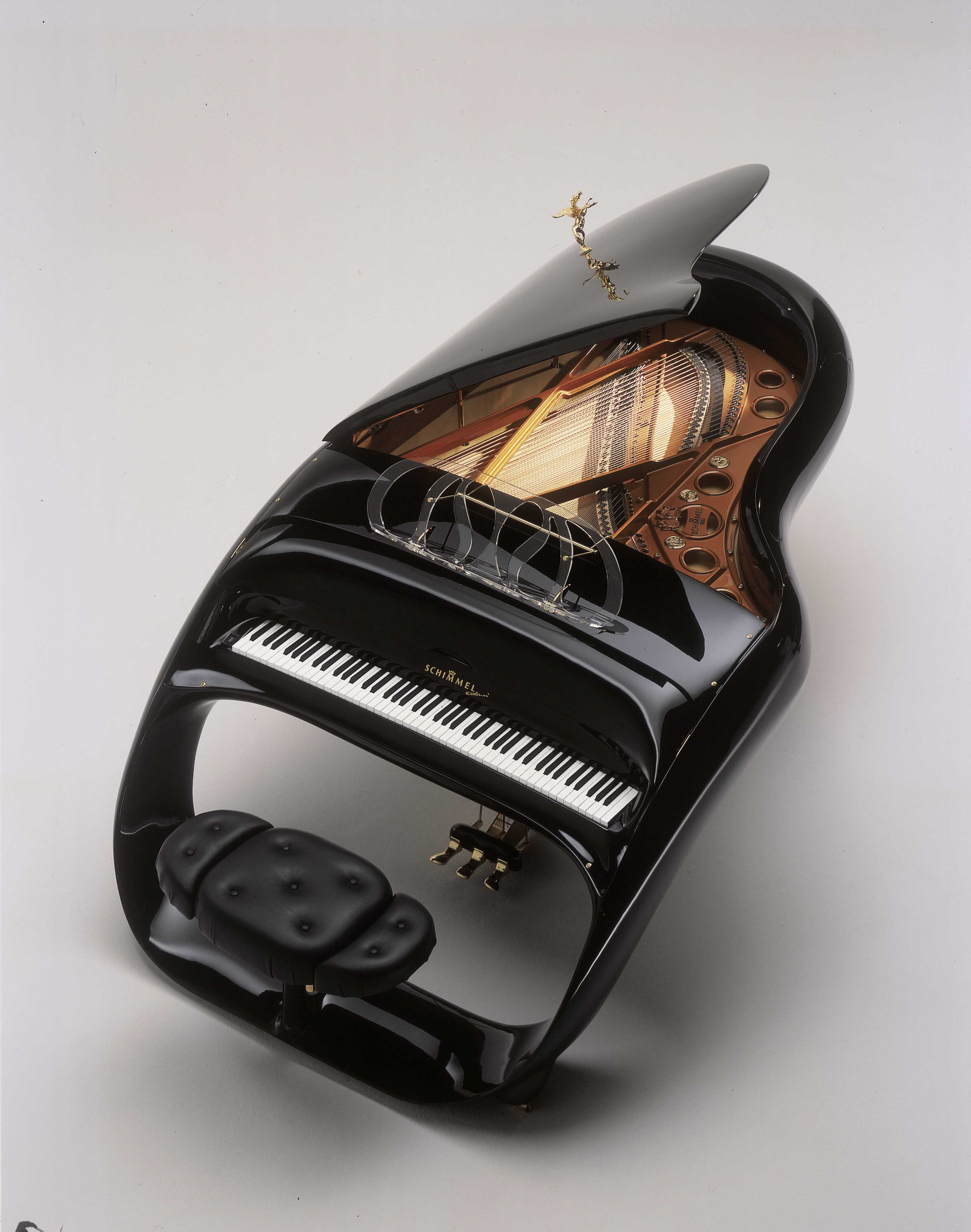 Schimmel Pegasus Flügel, Schimmel Art-Collection